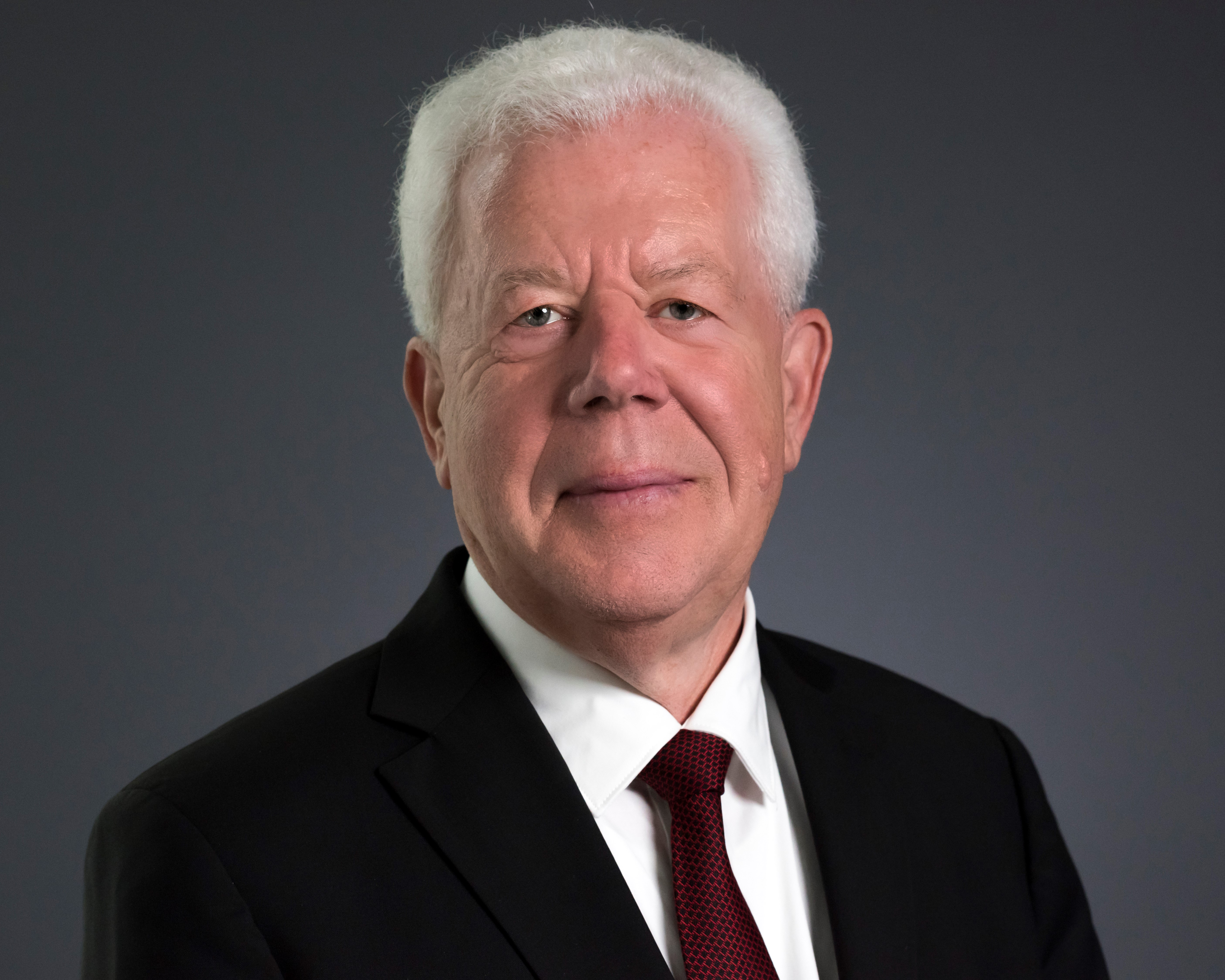 Udo van Kampen (© 2018 Kekst CNC)